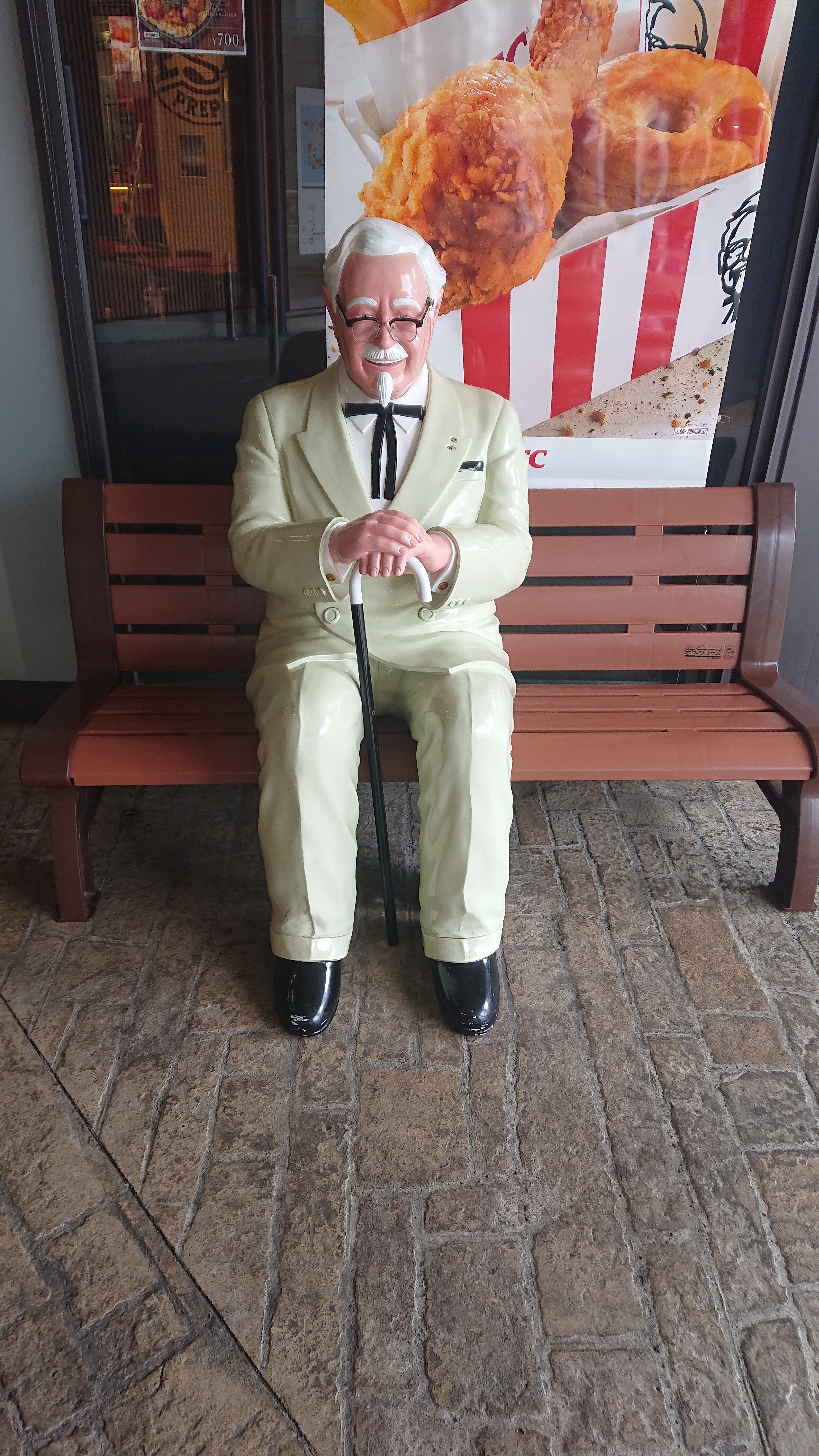 2018年7月よりケンタッキーフライドチキン東京ドームシティラクーア店に設置されているベンチに座ったカーネルサンダース像「おすわりカーネル」。